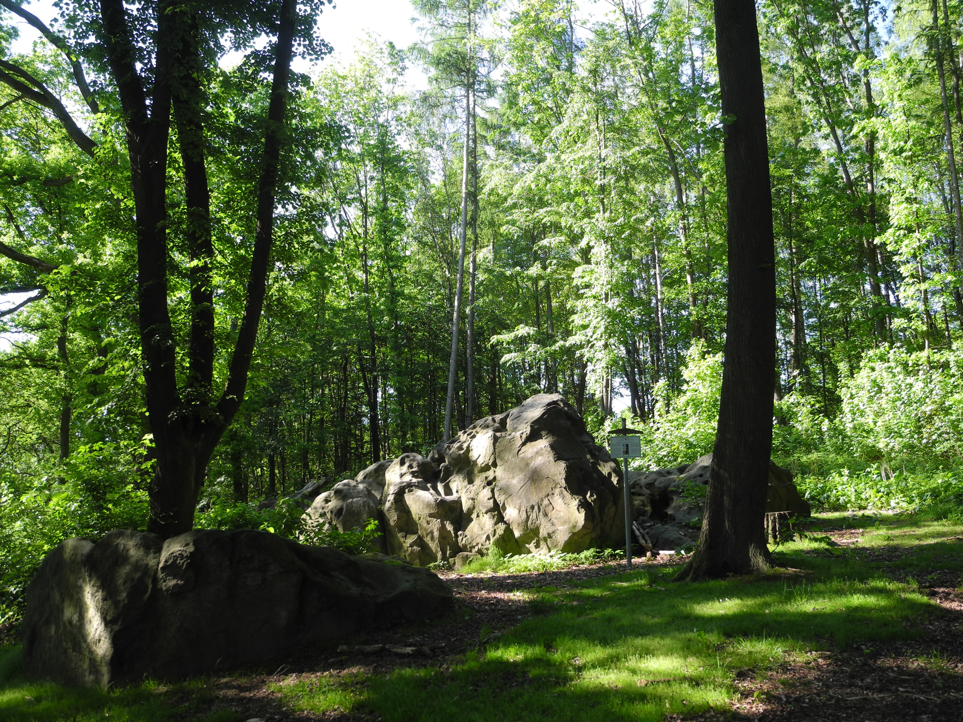 Flächenhaftes Naturdenkmal im Landkreis Kassel 6.33.405. Quarzitblöcke "Das Große Loh" am nordöstlichen Ortsrand von Immenhausen.